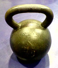 kettlebell